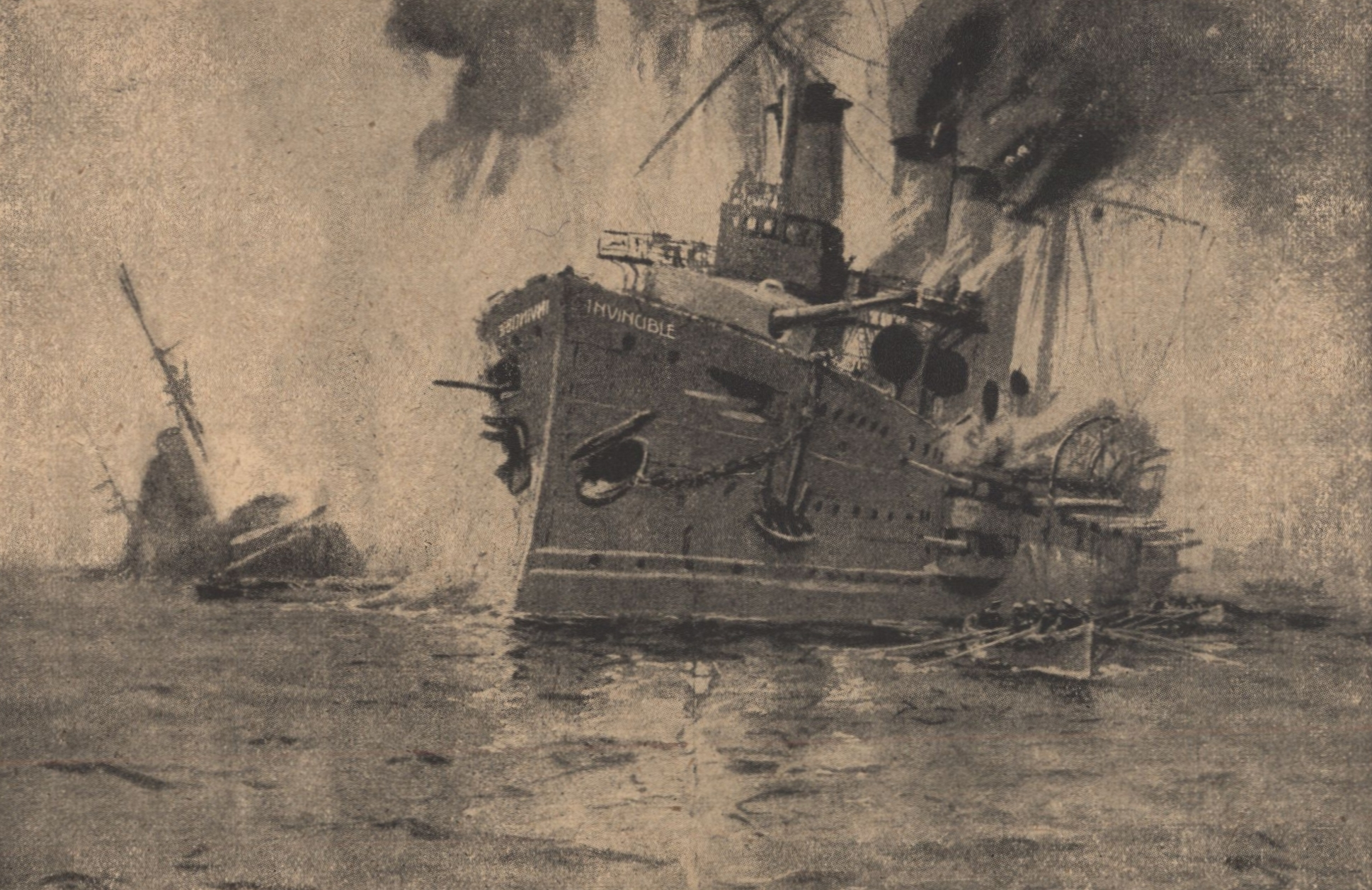 Az Invincible elsüllyesztése.